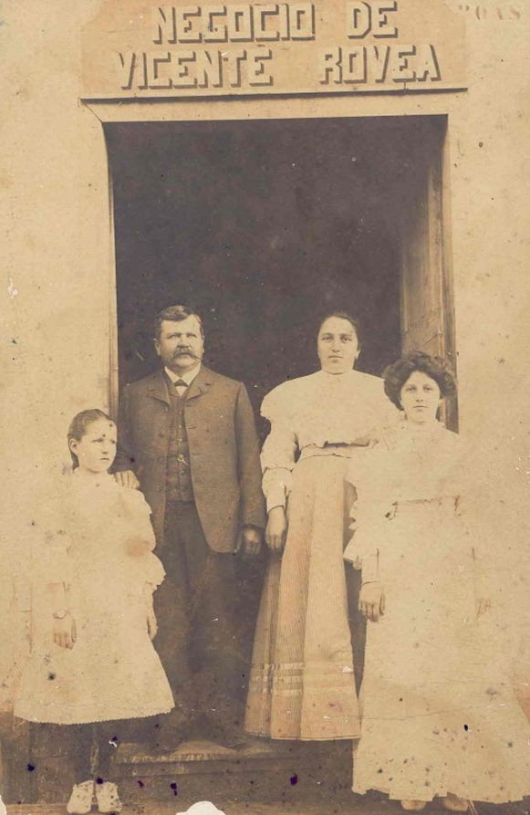 Vicente e Bortolina Rovea com as filhas Rosina e Angelina. A foto é doação de Cléver Moreira ao Arquivo Histórico Municipal João Spadari Adami